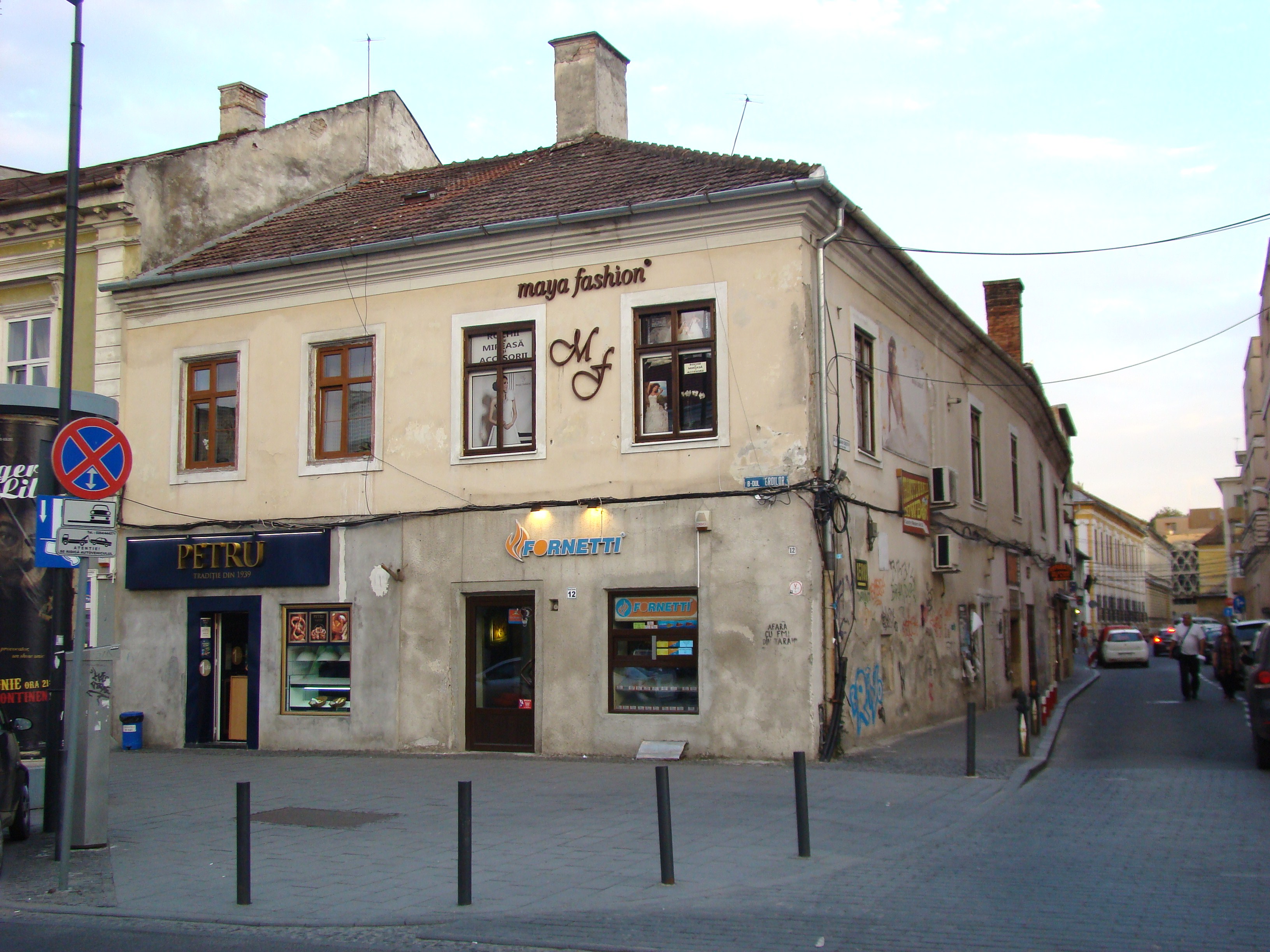 Clădire monument istoric, Bd.Eroilor, nr.12